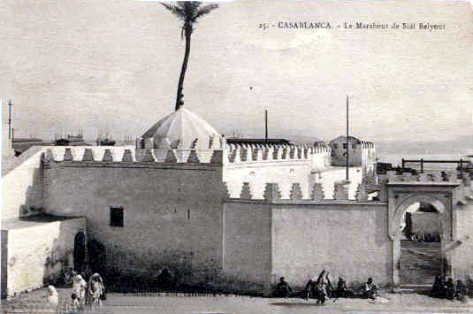 Koubba de Sidi Belyout